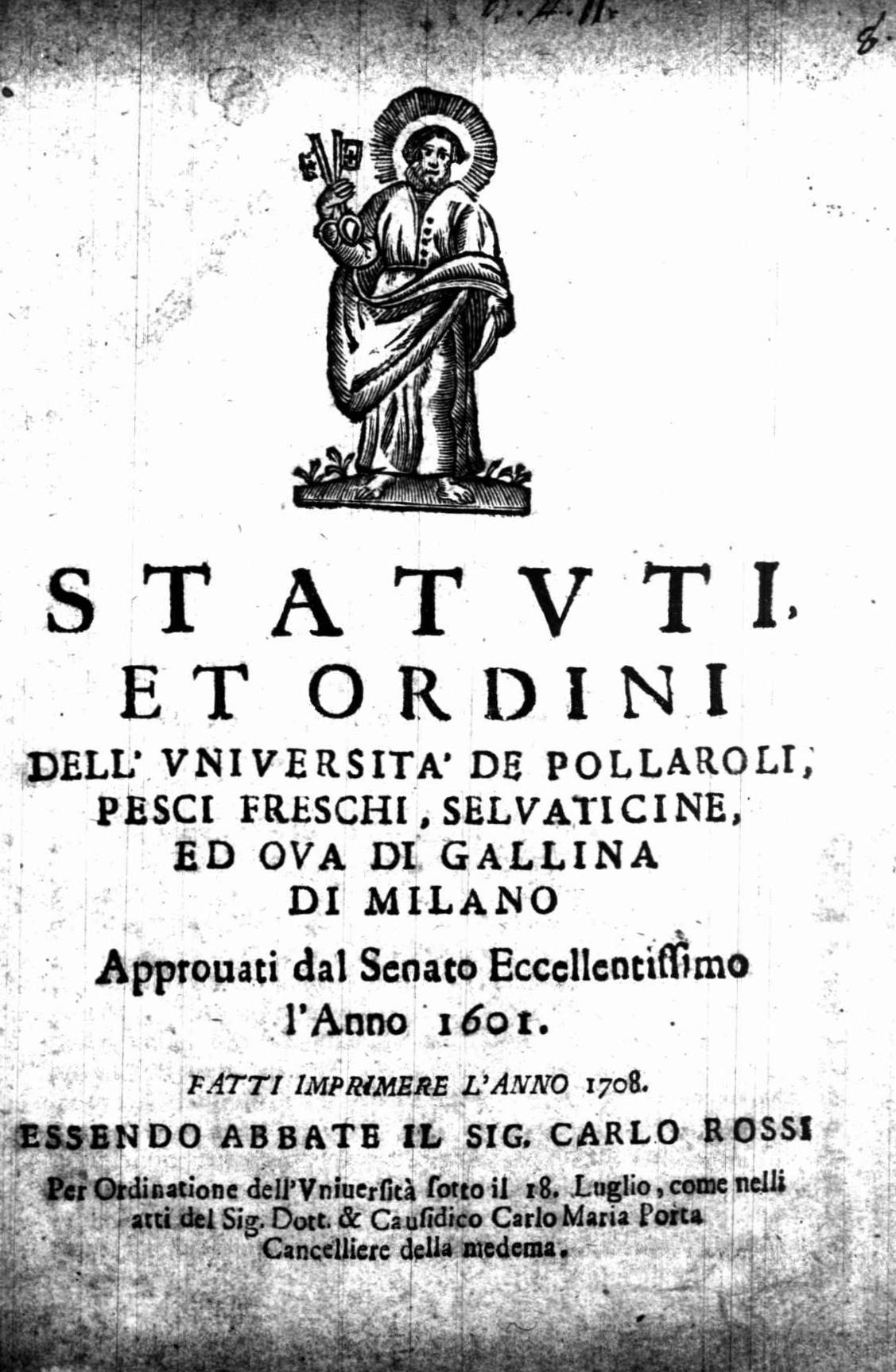 Frontespizio